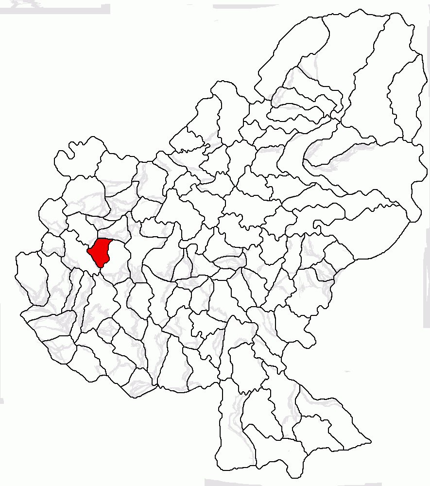 Categorie:Hărţi ale judeţului Mureş